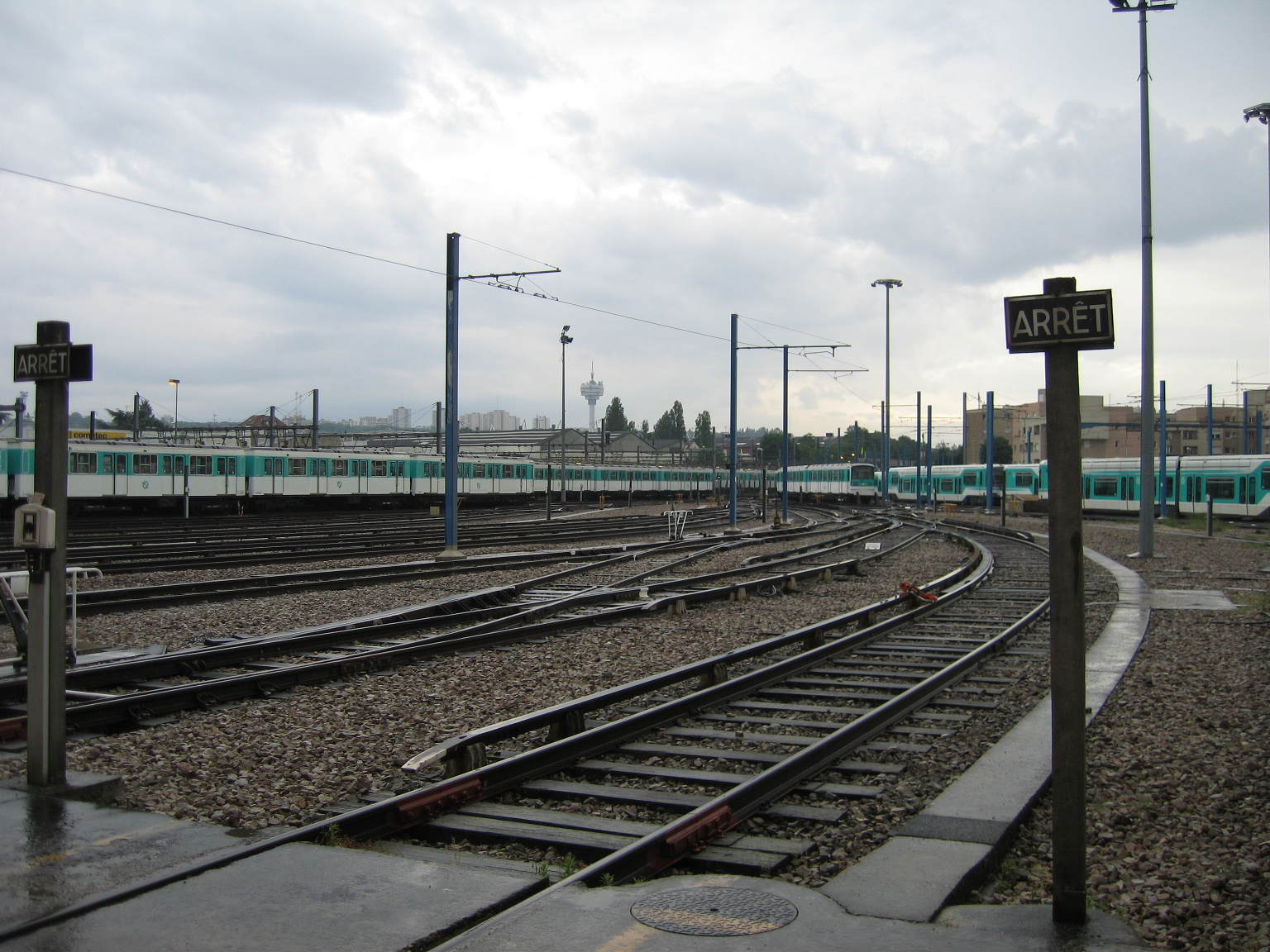 Garages dans l'atelier de Bobigny. JPO Atelier de Bobigny 24/05/2008.